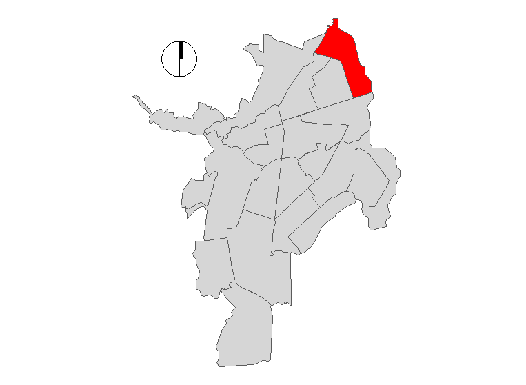 Comuna de 6 Santiago de Cali, Colombia.